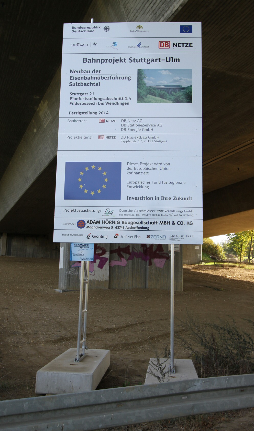 Das Bauschild an der Baustelle Sulzbachtalbrücke im Oktober 2012